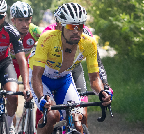 Mauricio Ortega en la etapa 8 de la Vuelta a Colombia 2016